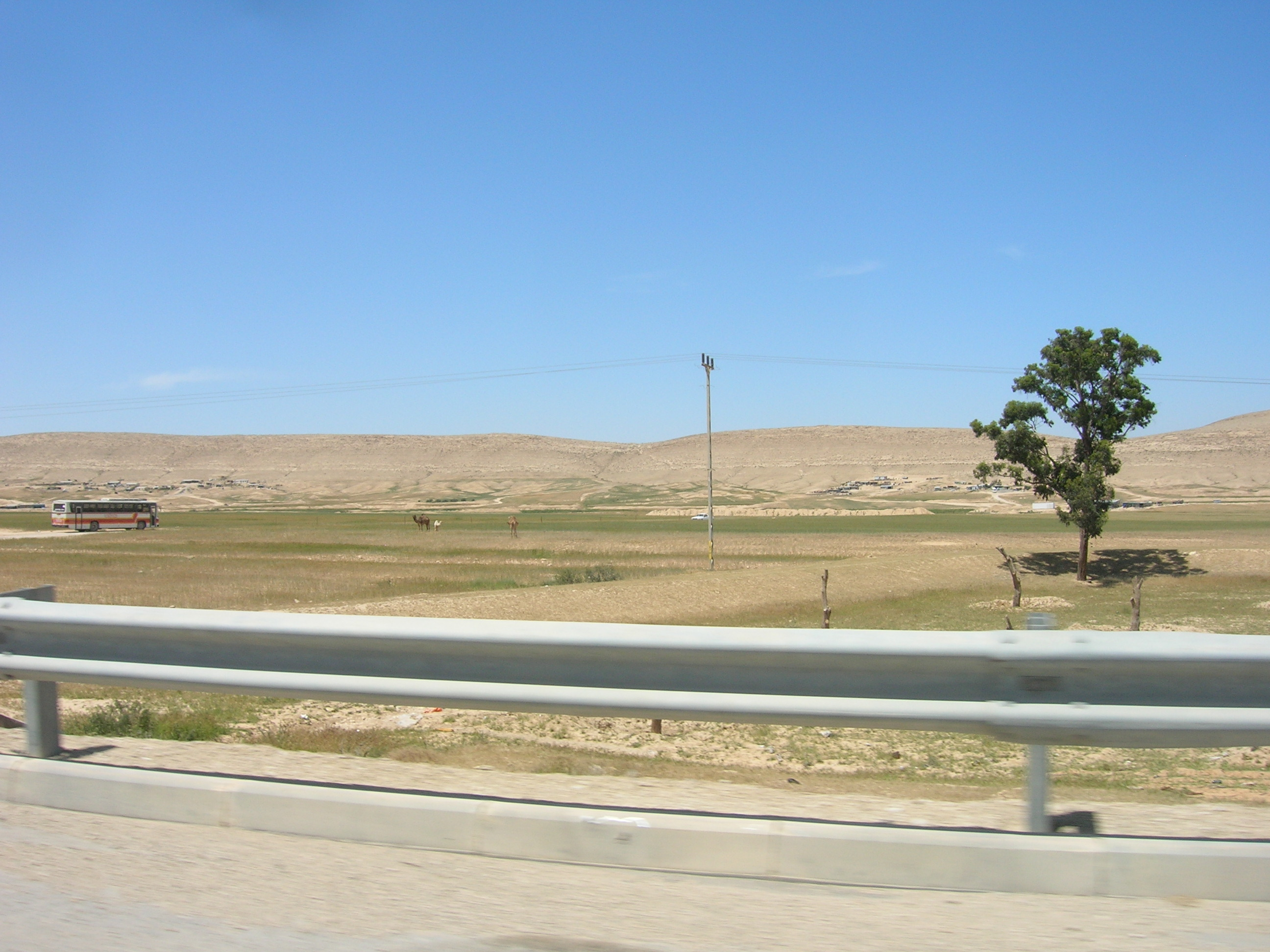 i042107 221 Negev